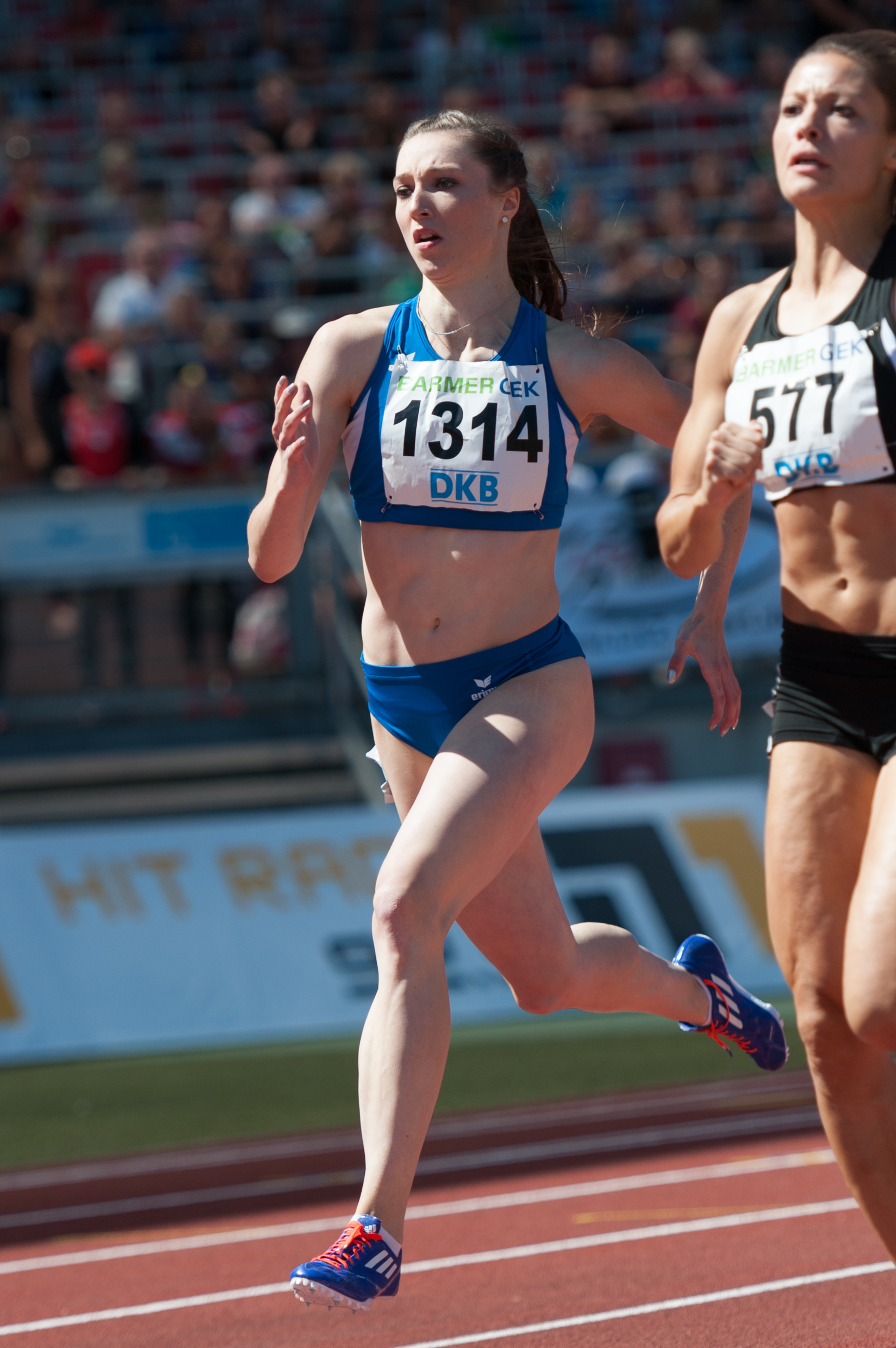 Deutsche Leichtathletik-Meisterschaften 2015: Frauen 400m - Laura Müller